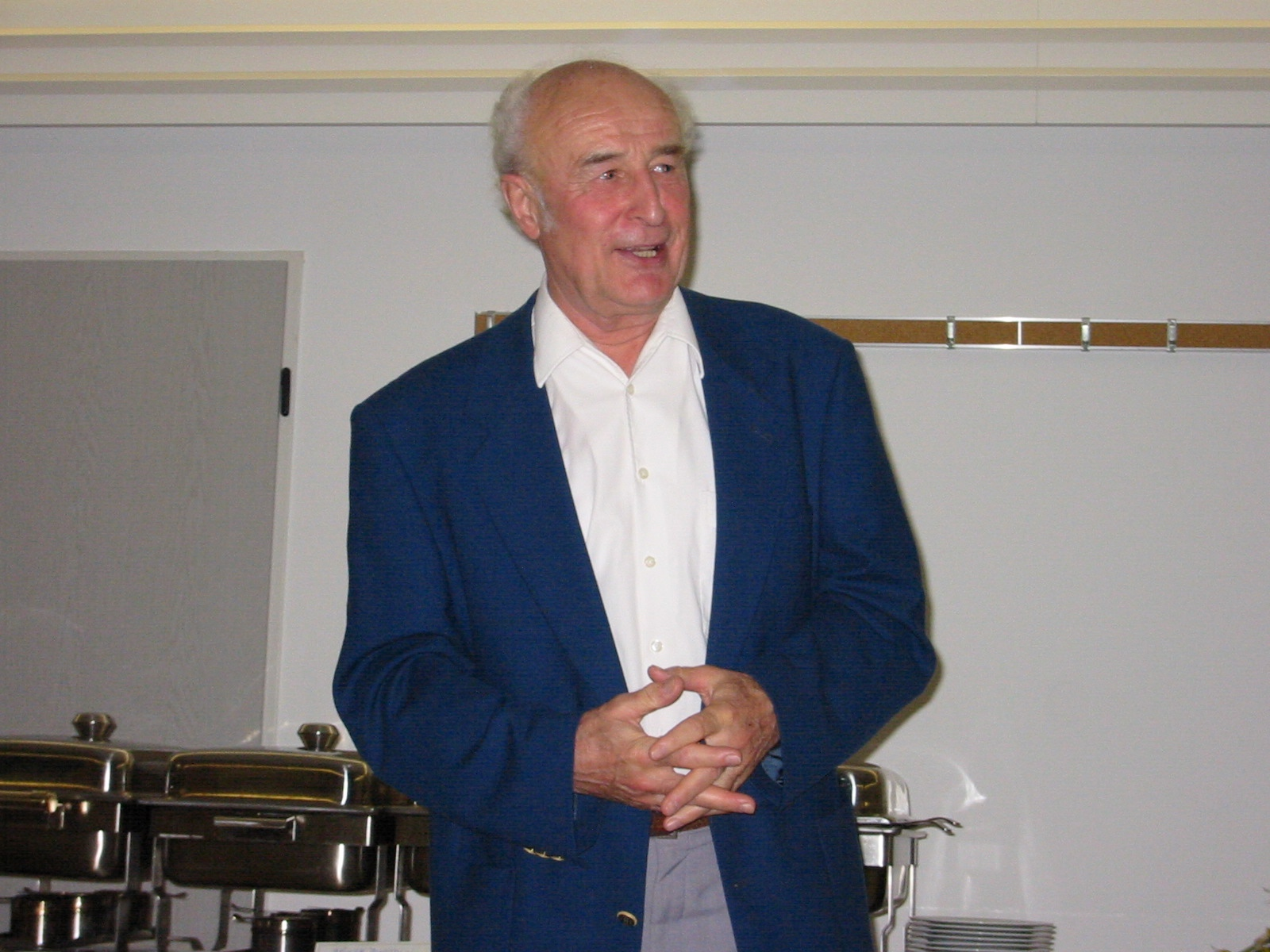 Geburtstagsfeier